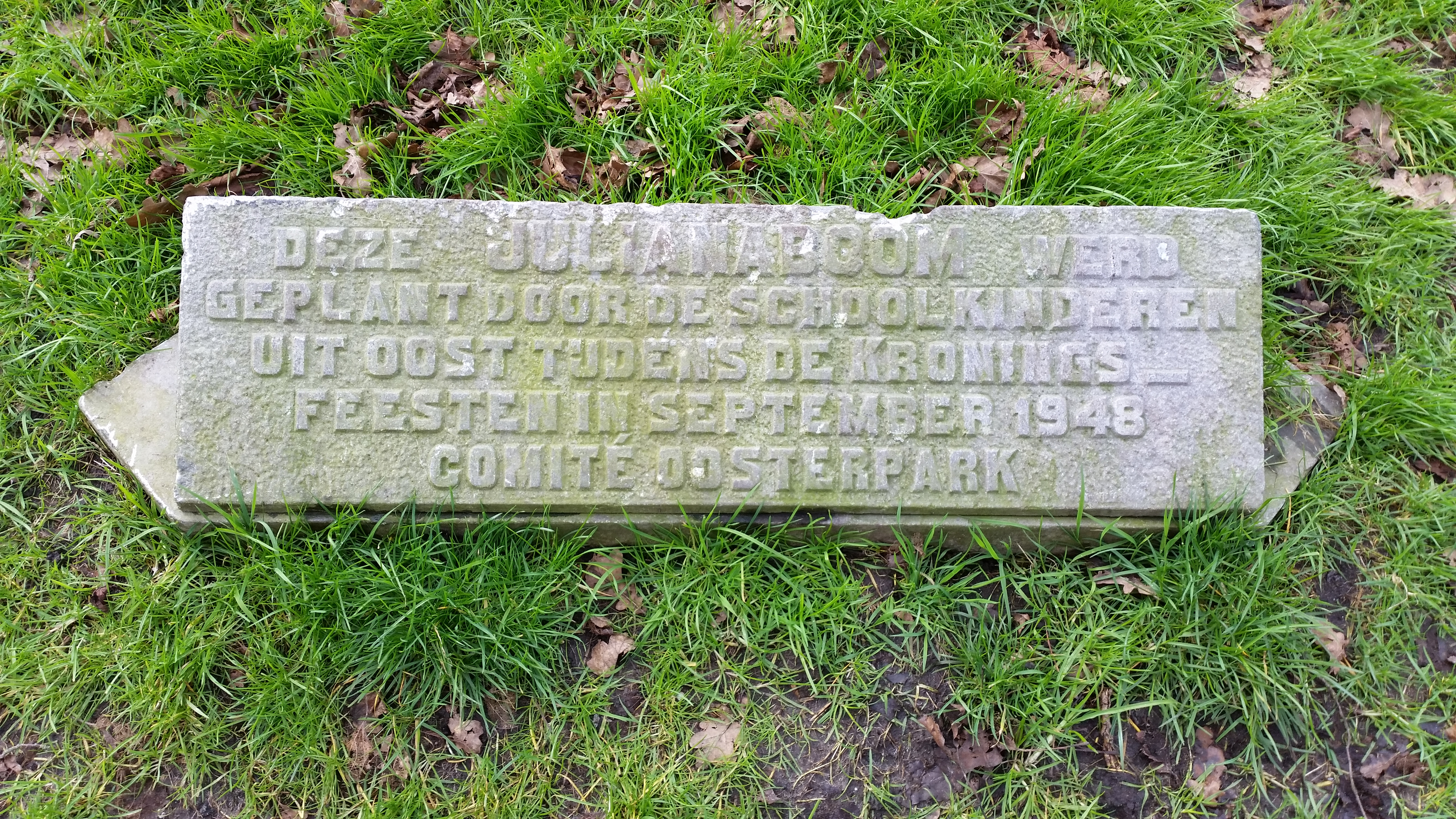 Tekststeen Julianaboom; een steen ter begeleiding van een door kinderen geplante boom in het Oosterpark op de datum van kroning van Juliana tot koningin.